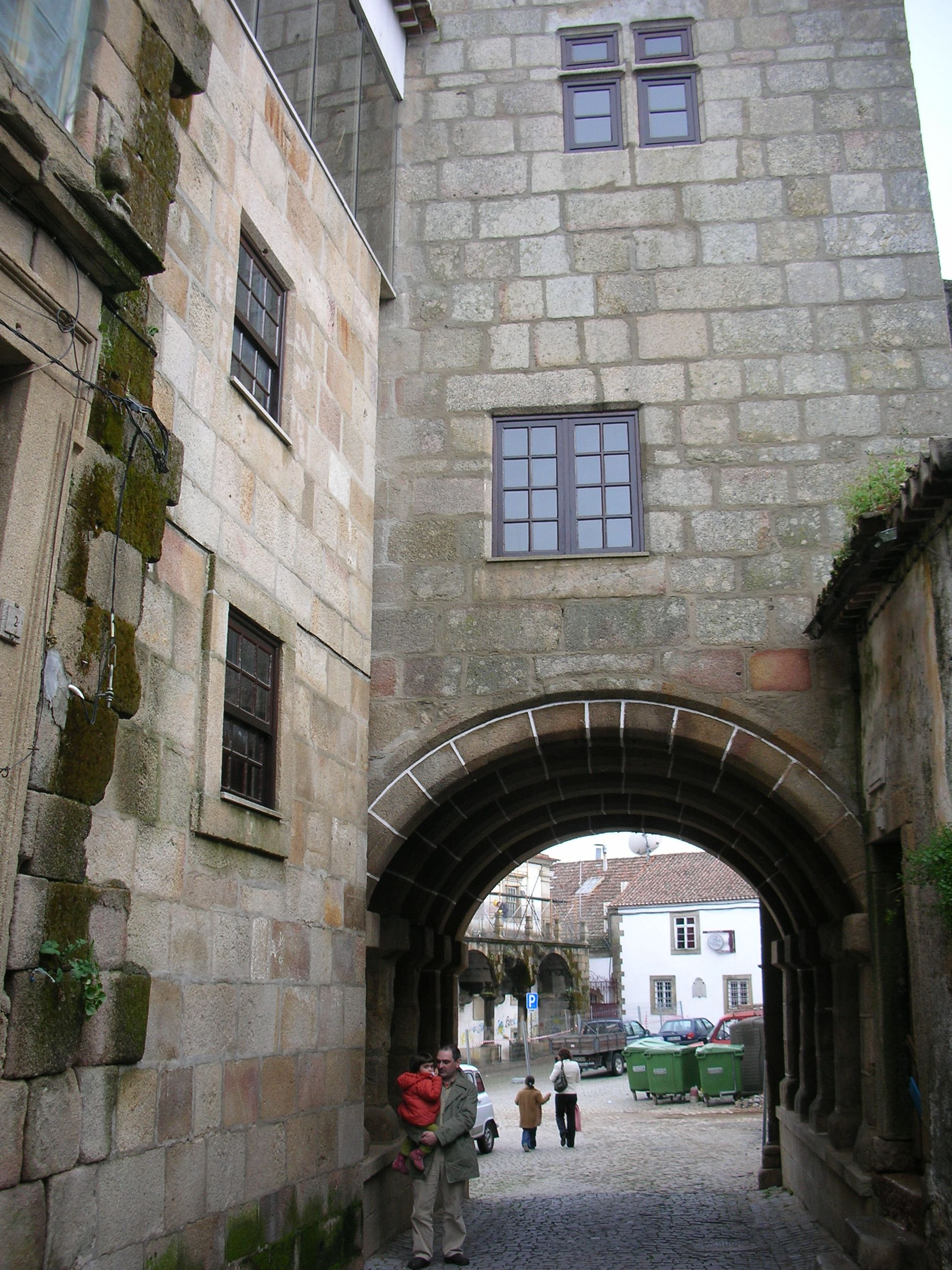 Castelo Branco, Portugal: o chamado Arco do Bispo, na Casa do Arco do Bispo. Aqui teria existido uma das antigas portas da cerca da cidade, a chamada "Porta dos Pelames".